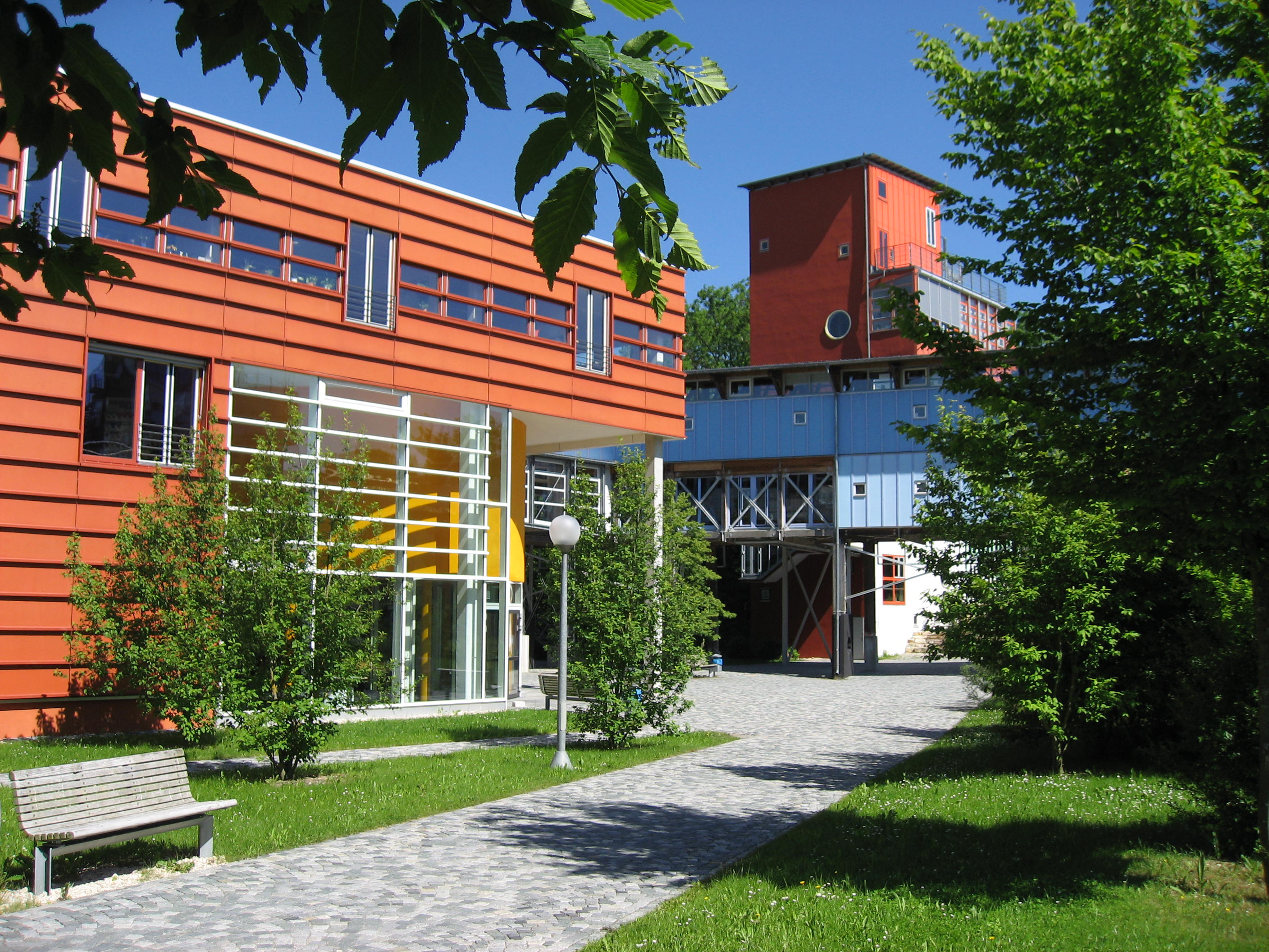 Universität Ulm, Bibliothek